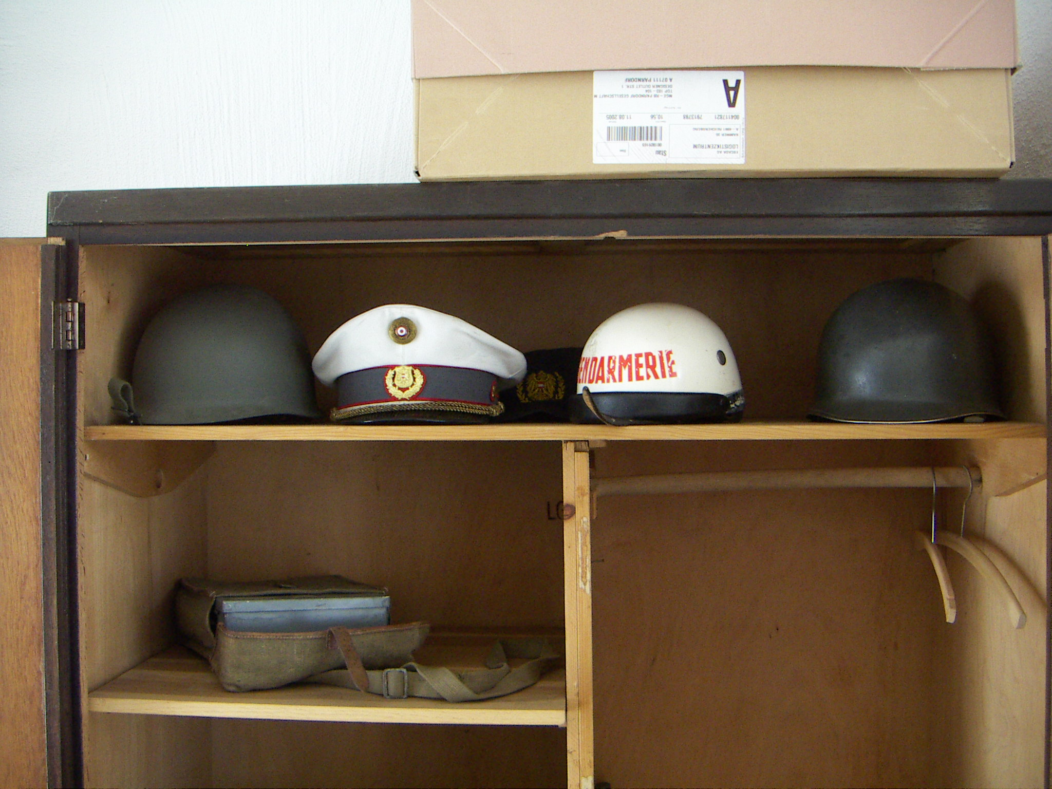 Historische Gendarmerie Österreich, Helme, Kappe, Dorfmuseum Mönchhof